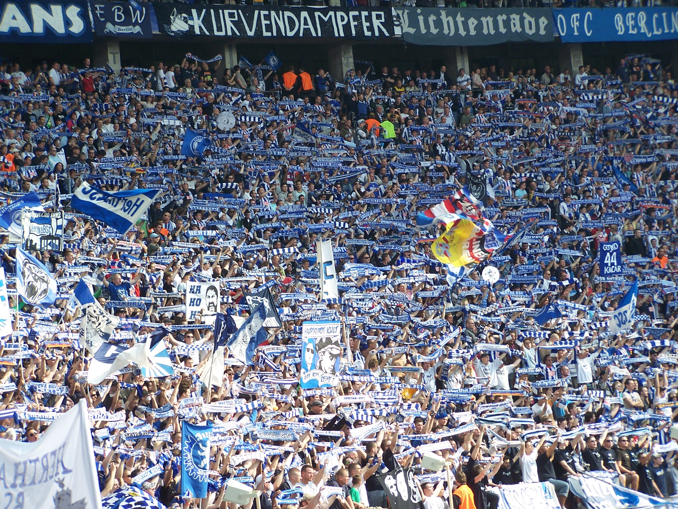 Stimmung im Olympiastadion